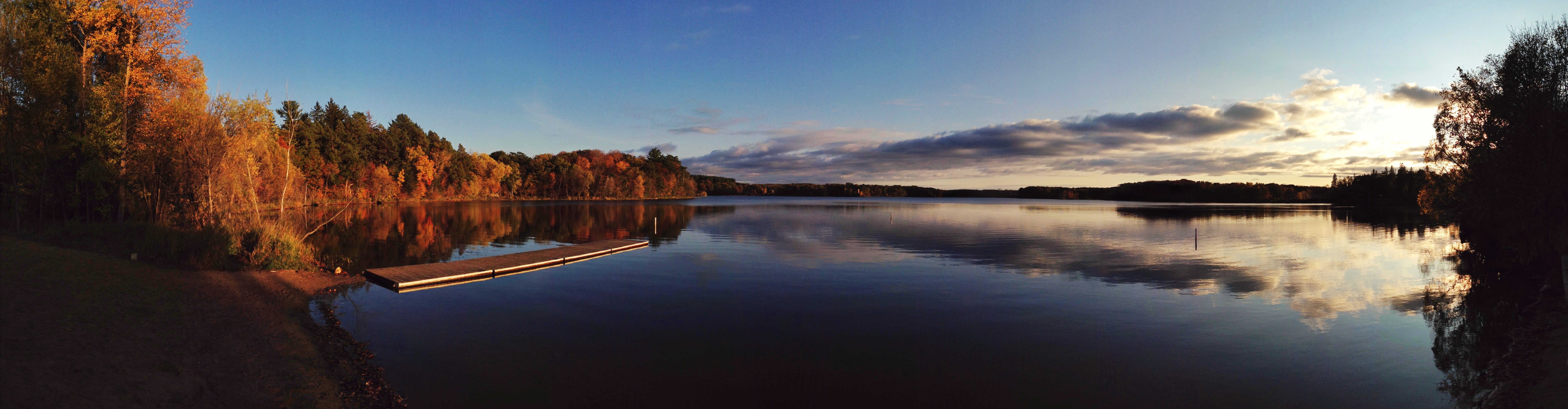 Lake Sagatagan in Collegeville, MN